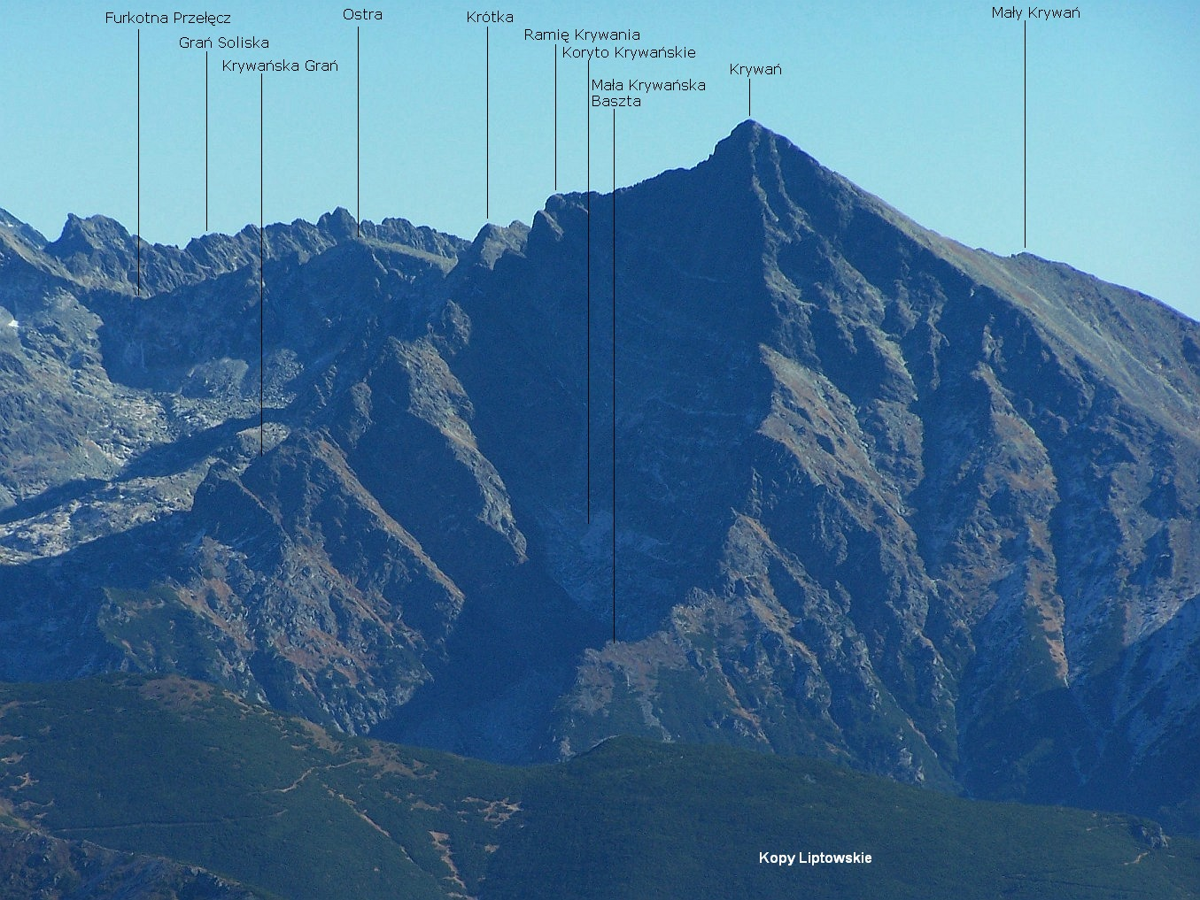 Widok na Krywań i jego otoczenie